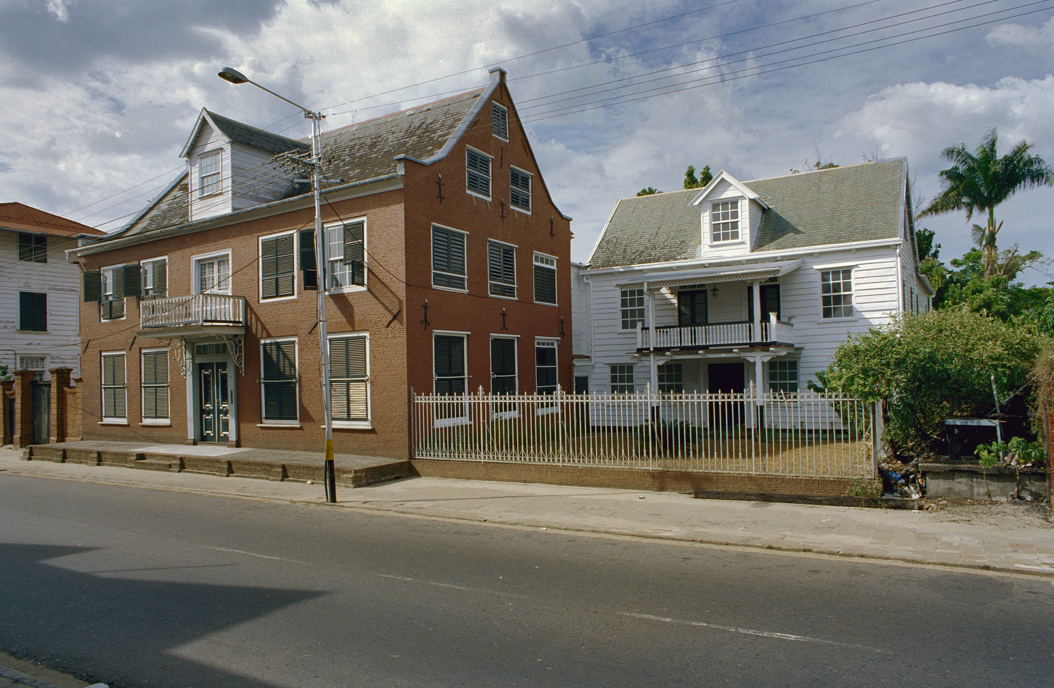 Bisschopshuis: Overzicht voorgevels en rechter zijgevel (opmerking: Suriname Reis Loek Tangel)